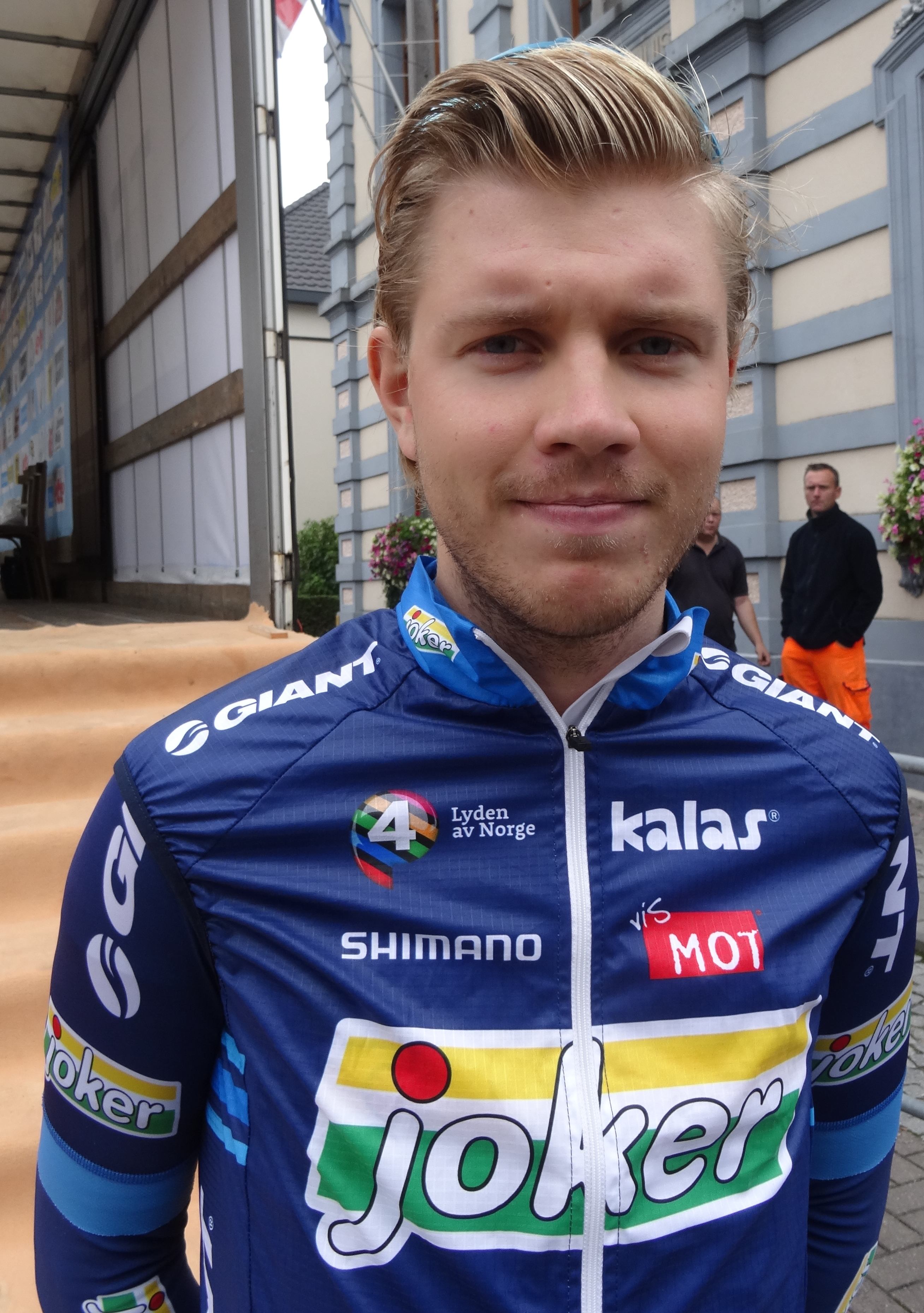 Reportage photographique réalisé le mercredi 27 août à l'occasion du départ de la Druivenkoers Overijse 2014 à Huldenberg, Belgique.